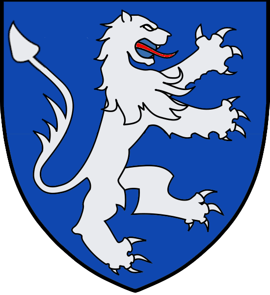 Vapensköld för svenska adelsätten von Post